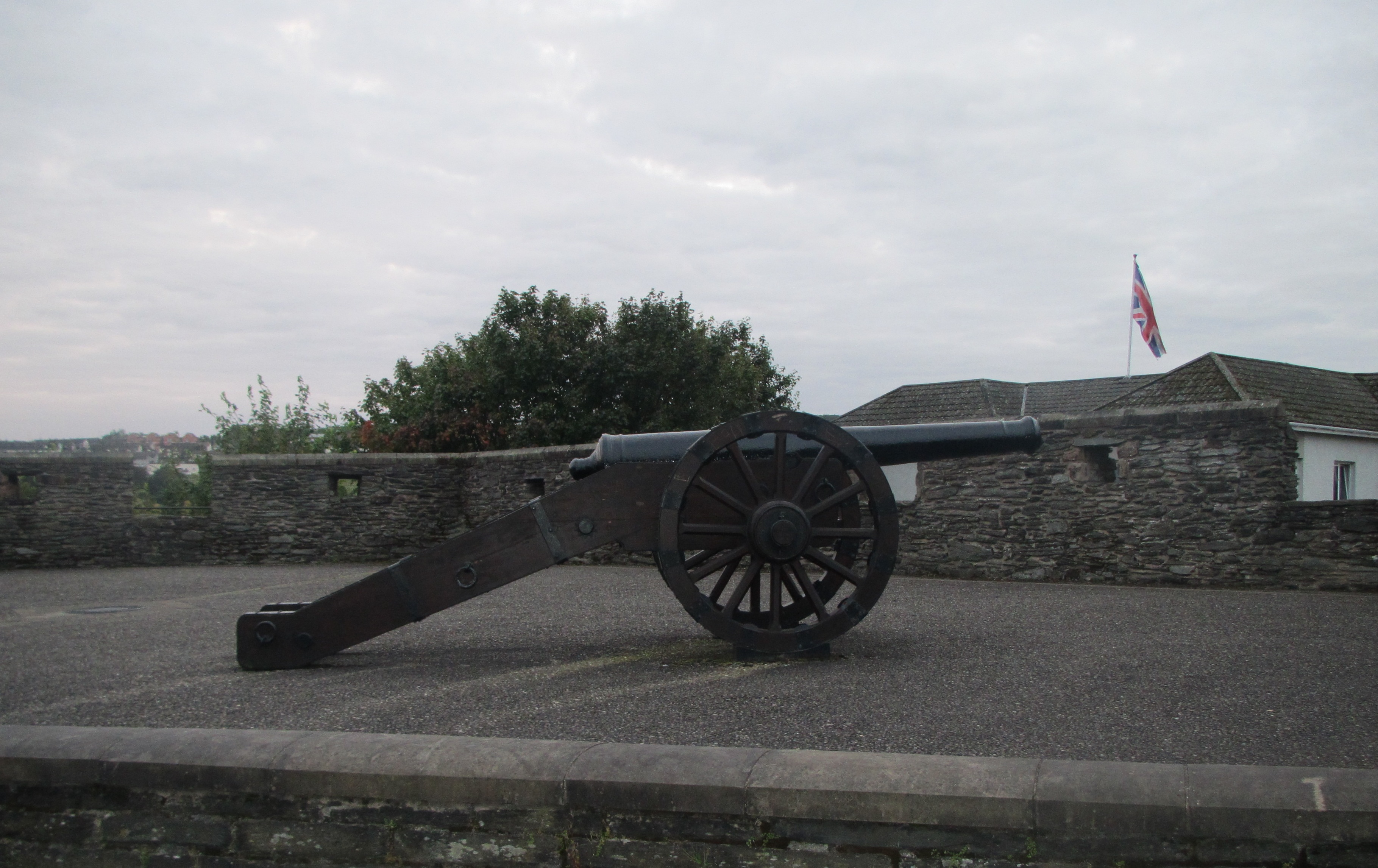 cannon on the walls of derry by Paride